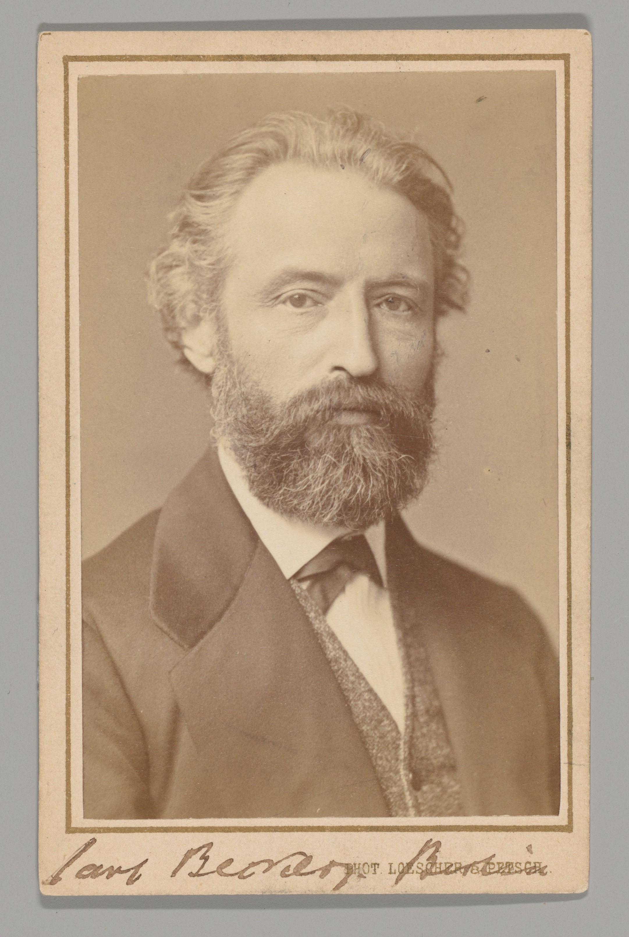 Carte-de-visite; Photographs